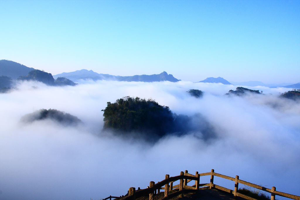 武夷山天游峰云海